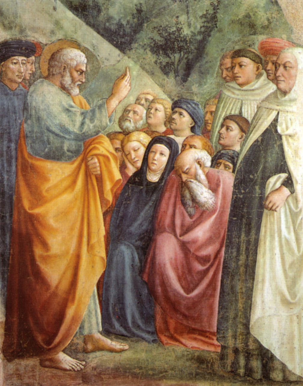 Predica di San Pietro (restaurato)